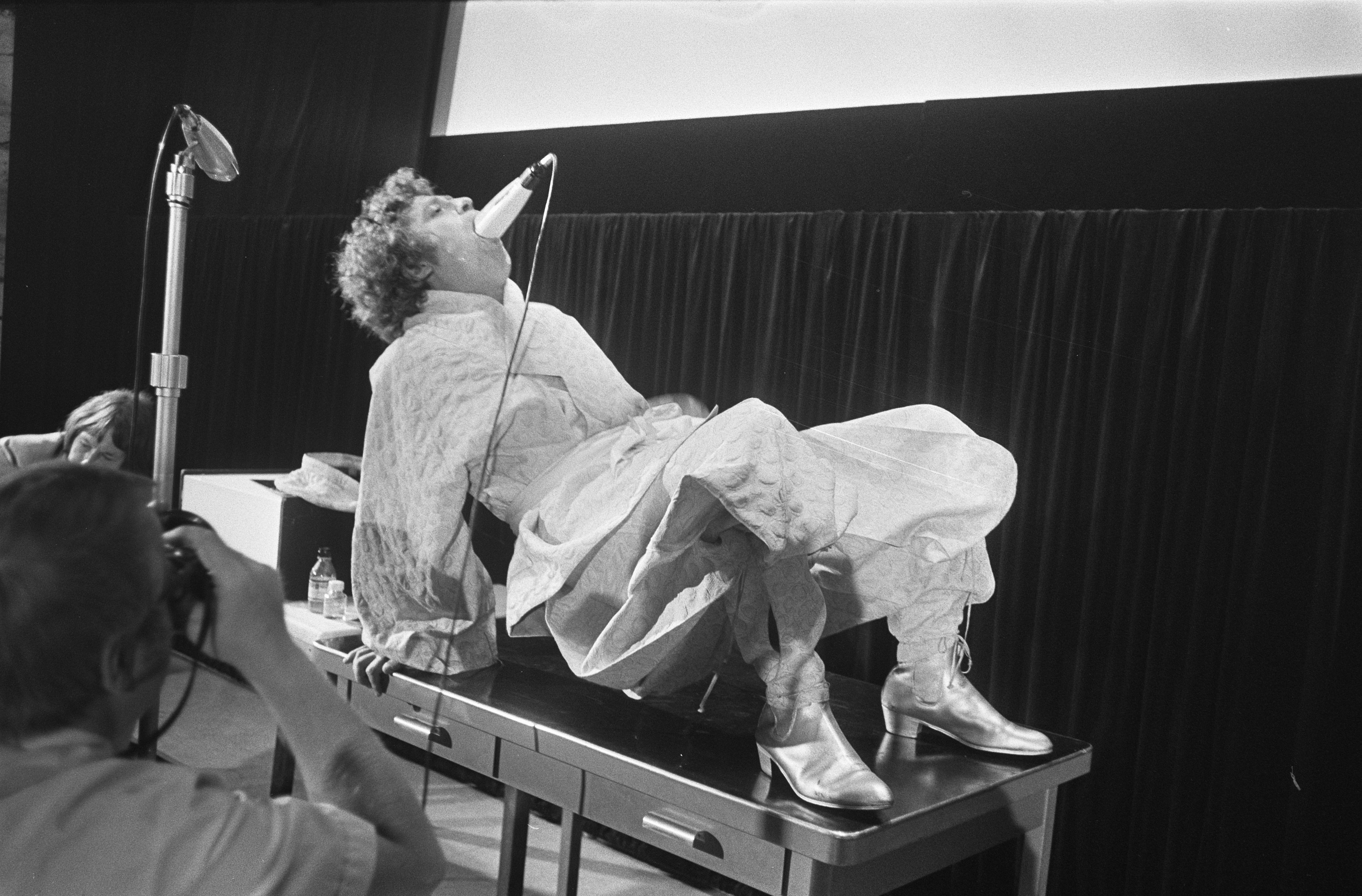 Collectie / Archief : Fotocollectie Anefo Reportage / Serie : Johnny "The Selfkicker" van Doorn, Nederlands schrijver, dichter en voordrachtskunstenaar, presenteert een plaat Beschrijving : Johnny The Selfkicker tijdens een act Datum : 7 augustus 1969 Trefwoorden : dichters, schrijvers, voordrachtskunst Persoonsnaam : Doorn, Johnny van, Johnny The, Selfkicker Fotograaf : Fotograaf Onbekend / Anefo Auteursrechthebbende : Nationaal Archief Materiaalsoort : Negatief (zwart/wit) Nummer archiefinventaris : bekijk toegang 2.24.01.05 Bestanddeelnummer : 922-6884